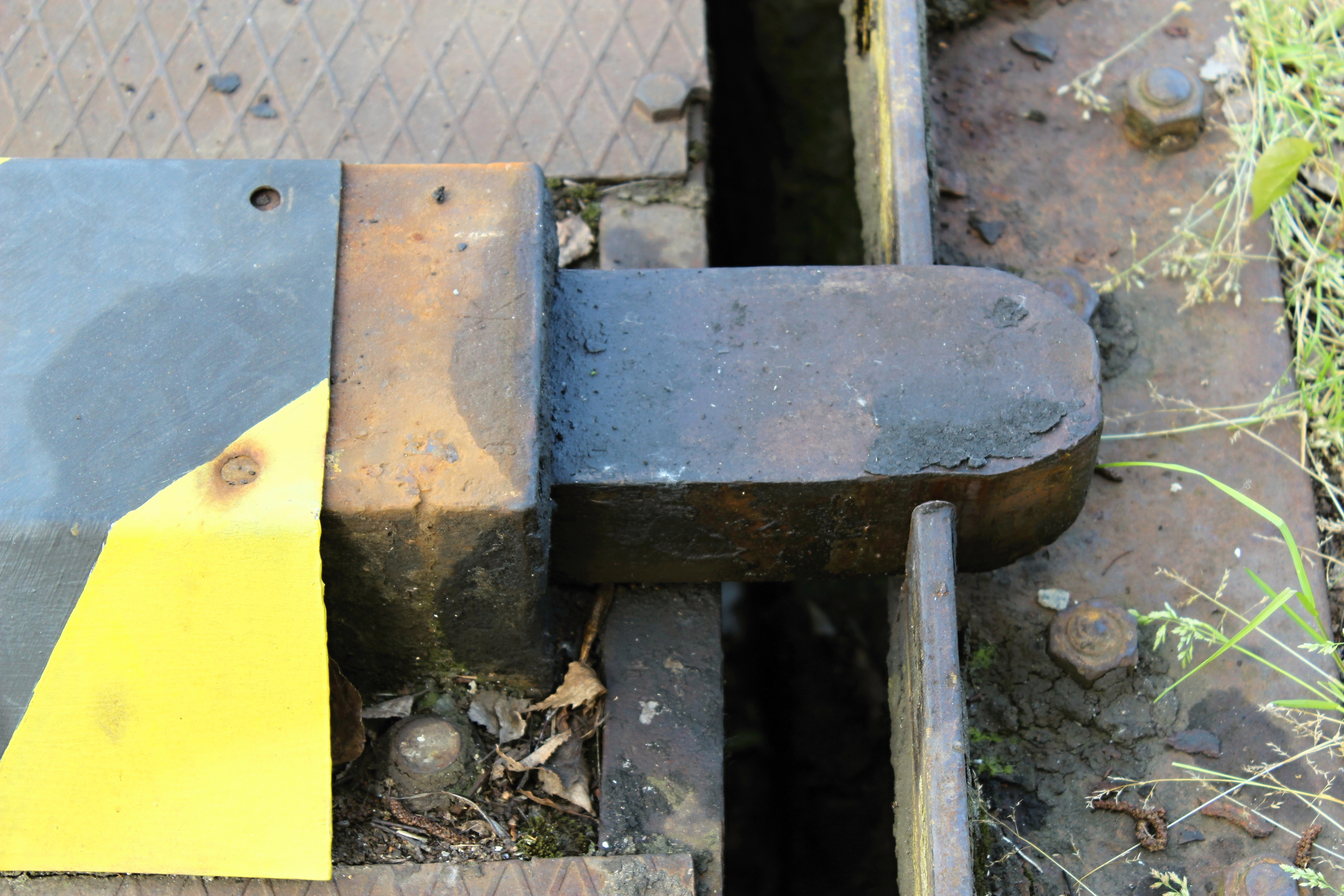 Vysunutý jazyk na točně na nádraží Benešov